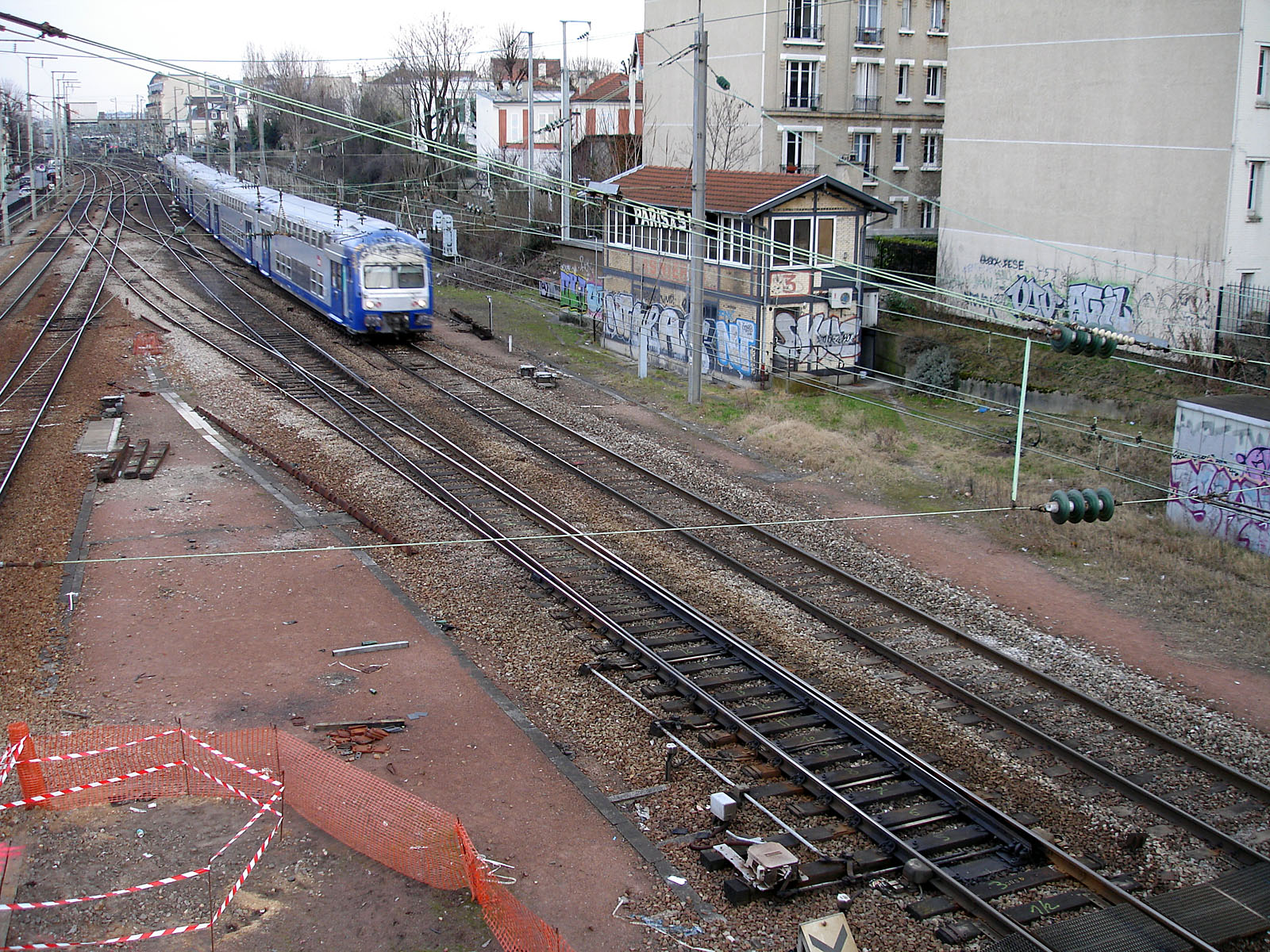 VO 2N passant à Asnières-sur-Seine, Hauts-de-Seine, France.